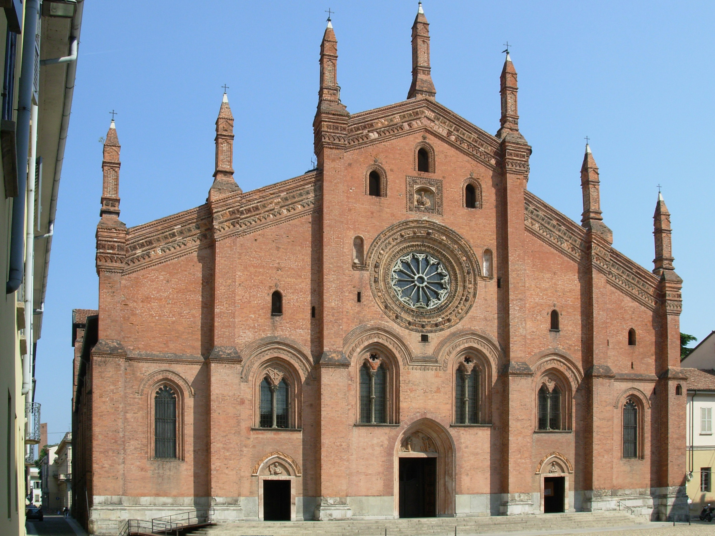 Santa Maria del Carmine a Pavia.